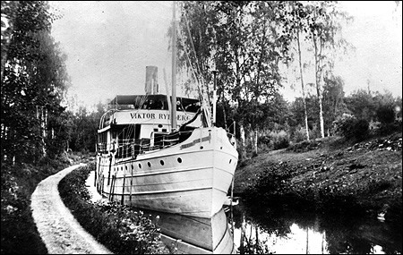 S/S Viktor Rydberg vid Lanthöjden, Töreboda, 1915